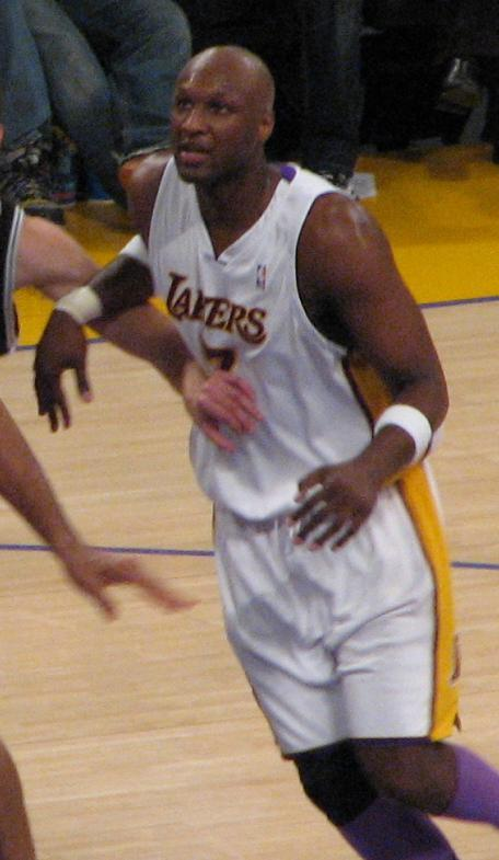 Lamar Odom, Los Angeles Lakers